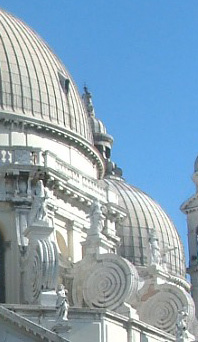 Volutes, Santa Maria della Salute, Venice